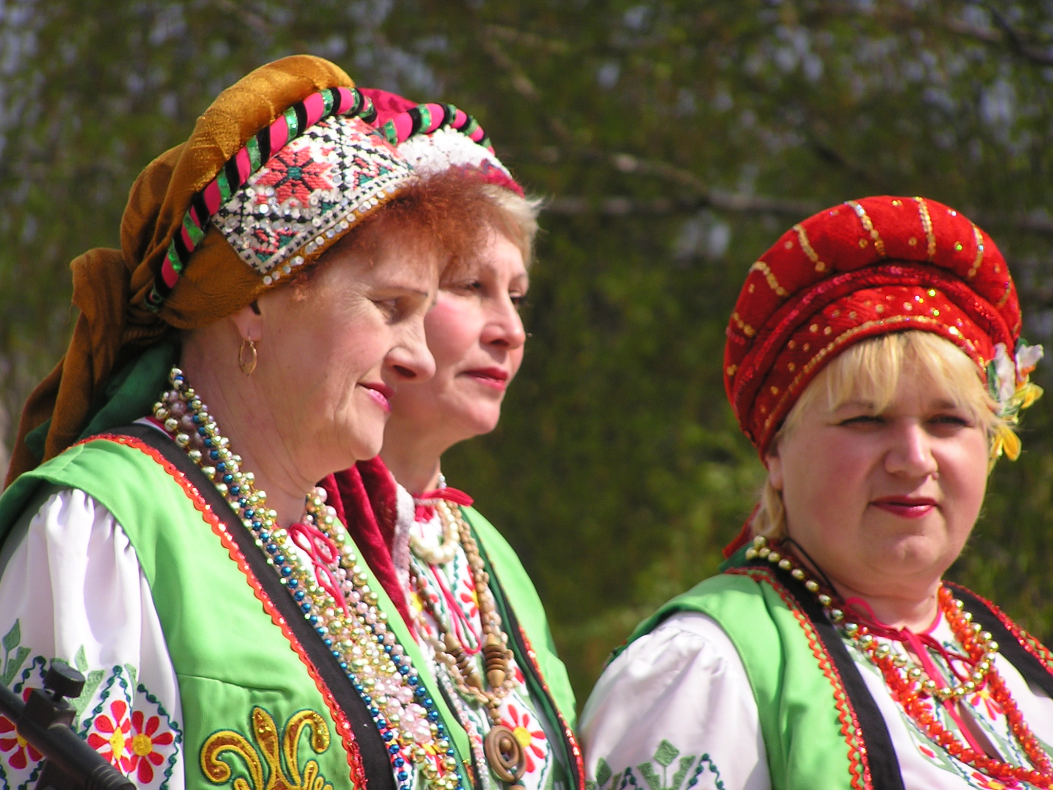 Донецк. Православный фестиваль "Пасха красная".